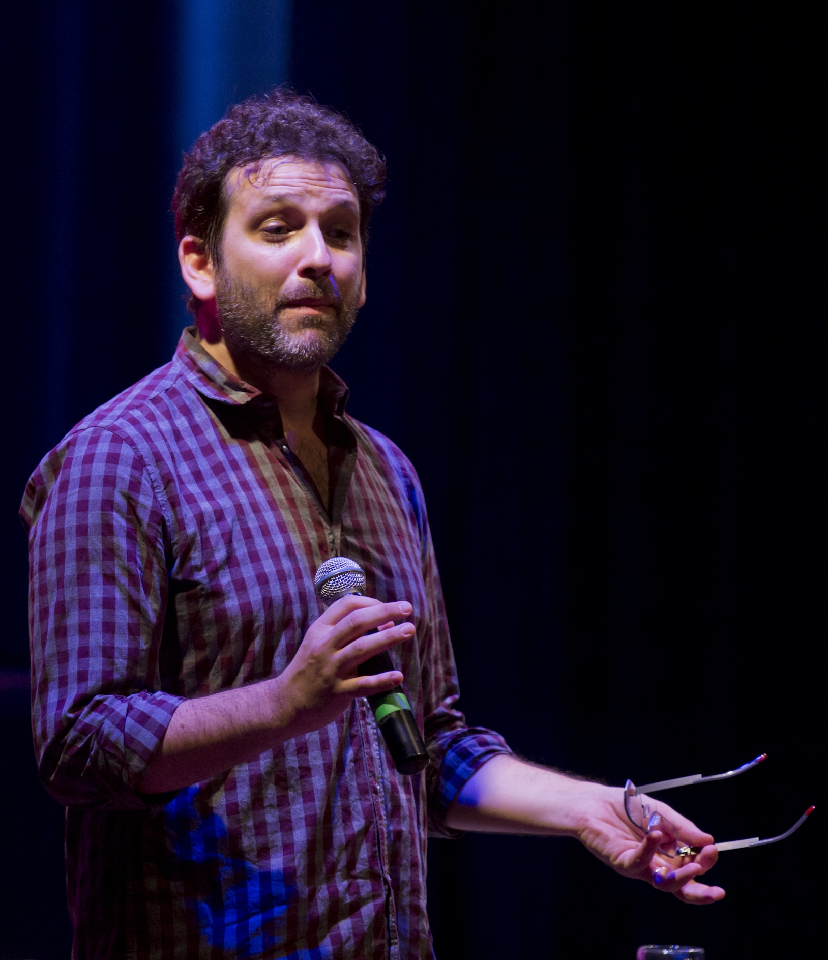 Posadas, 7 de abril de 2017 - El Ministerio de Cultura de la Nación Argentina realizó en "Tecnópolis Federal" Misiones, charlas sobre el escritor Horacio Quiroga a cargo del cineasta Andrés Sheinkman y del escritor Gonzalo Garcés.